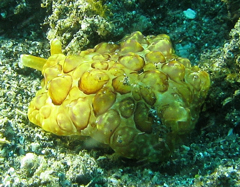 Pleurobranchus forskalii, juvenil en Lembeh, Indonesia